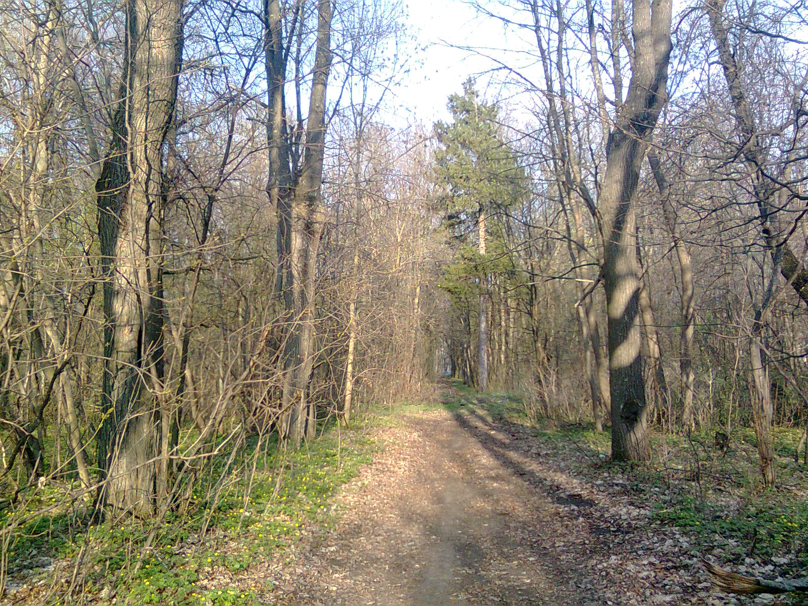 Весна в парке с. Гагарино